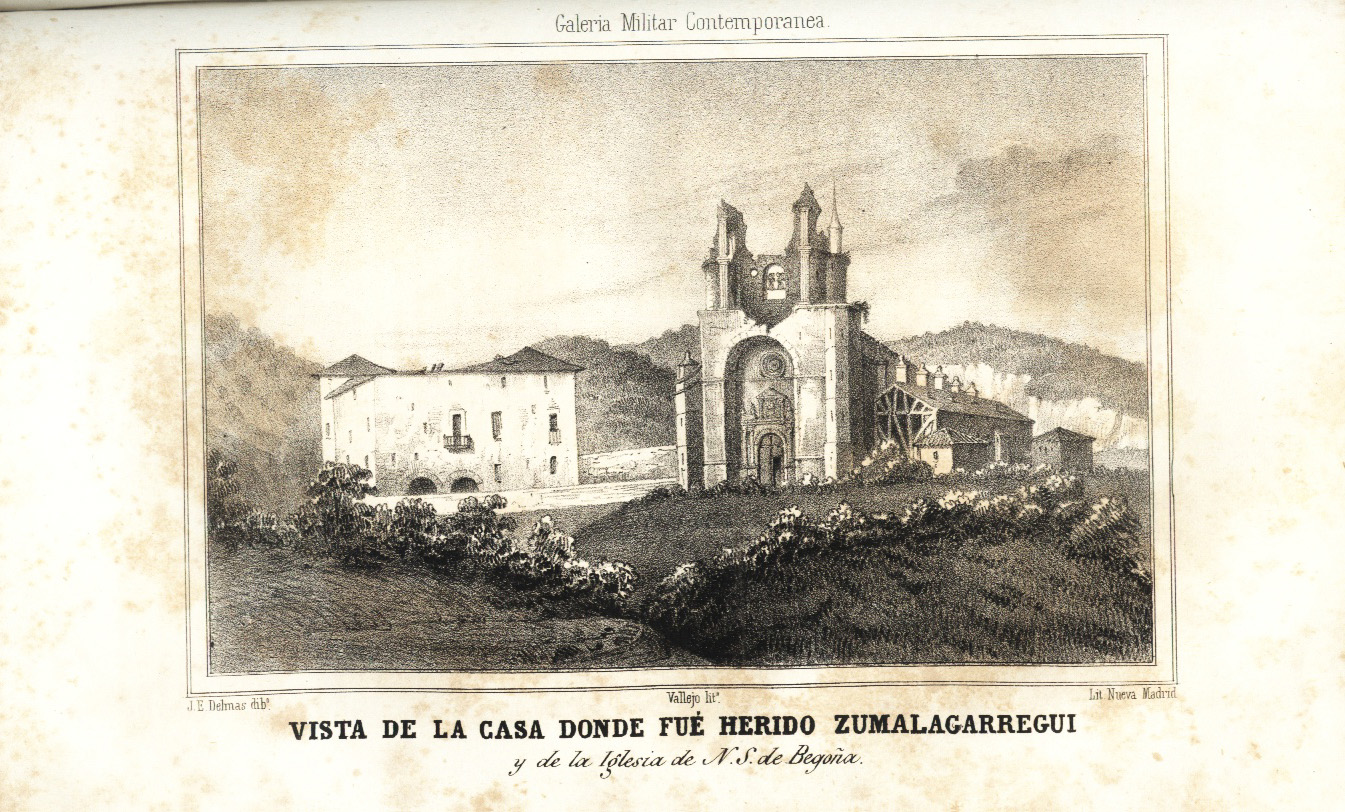 Bilbao, Iglesia de Begoña y casa donde fue herido Zumalacárregui. "Galería Militar Contemporánea". Madrid 1846